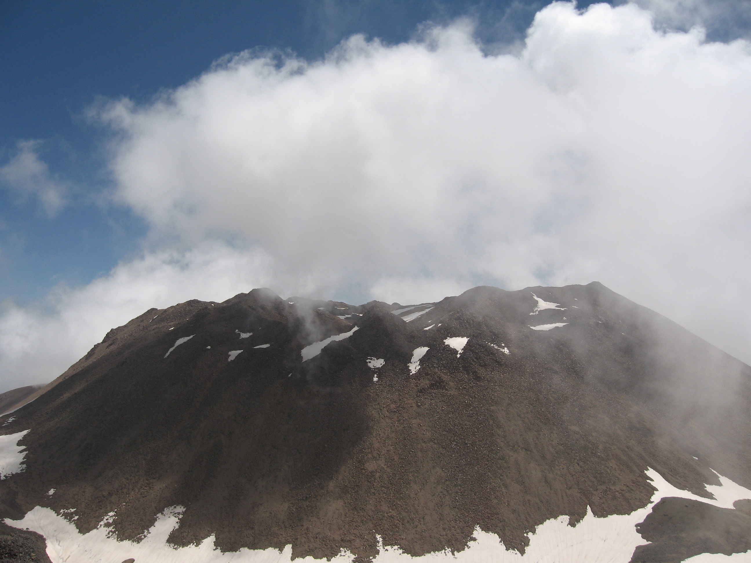 Bitlis Adilcevaz Mont SüphanTürkçe: Bitlis Adilcevaz Süphan Dağı